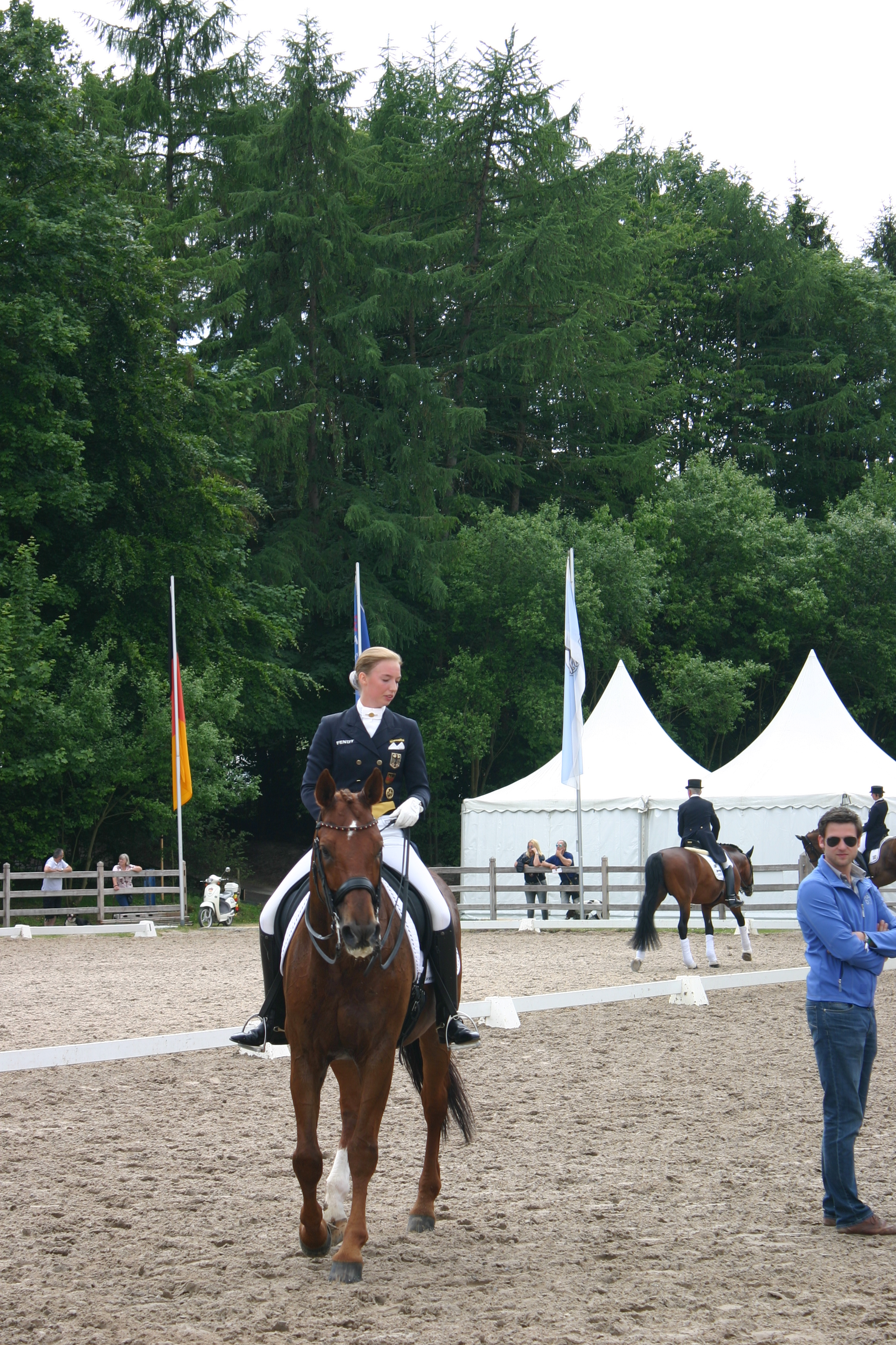 Fabienne Lütkemeier mit D'Agostino bei der Deutschen Meisterschaft im Grand Prix Special beim Balve Optimum 2015 auf dem Abreitplatz einige Zeit vor dem Start